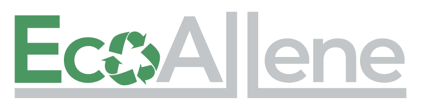 Logo del materiale